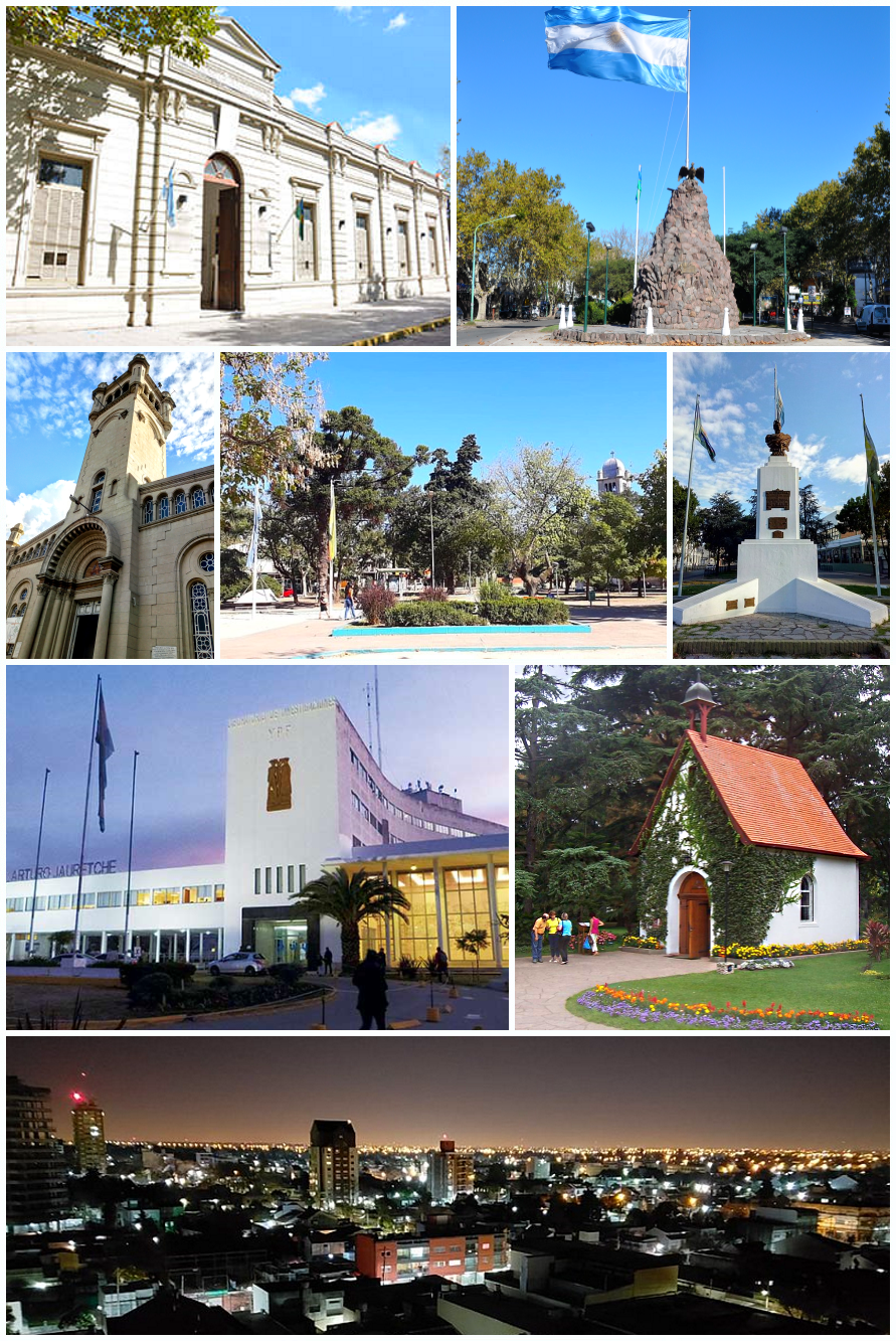 Montaje imágenes Florencio Varela